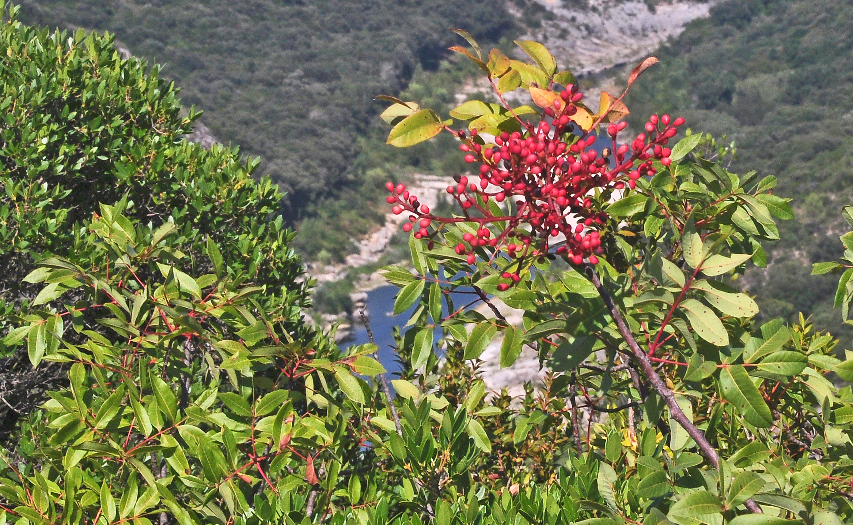 Un sol de prédilection: les terrains calcaires de Garrigues. Au fond les gorges du Gardon. Terrain de plantes calcicoles; chênes verts, arbousiers et filaires. Nous sommes en AOUT, arrivent les jeunes fruits du pistachier térébinthe. Autour de cet arbuste, son milieu botanique.